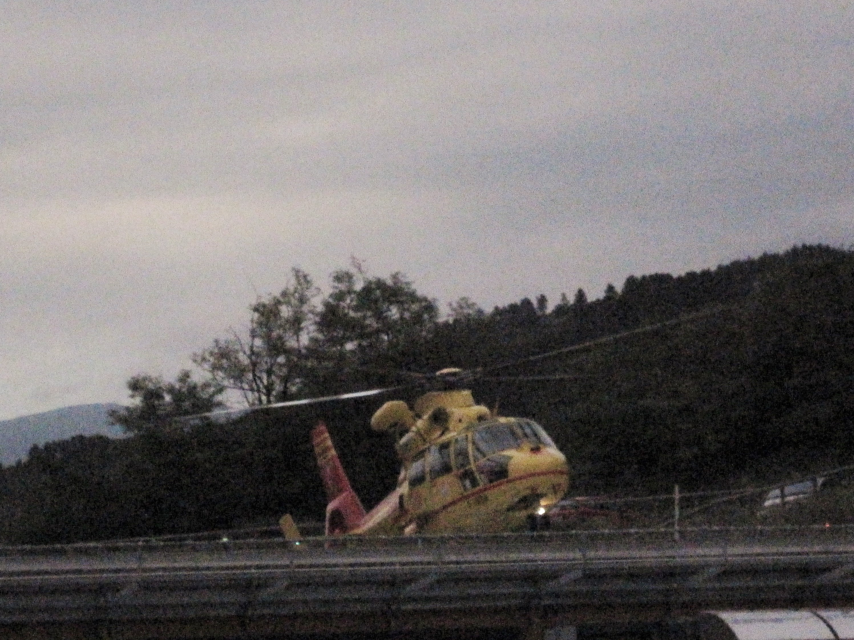 Ospedale Santa Maria del Carmine di Rovereto, mercoledì 27 luglio 2011, decollo in ore serali di un elicottero del 118 Trentino Emergenza (per me era un momento particolare, ed oggi nella mia memoria è ancora più imporante. Allora vivevo la speranza, ora mi resta solo il ricordo)